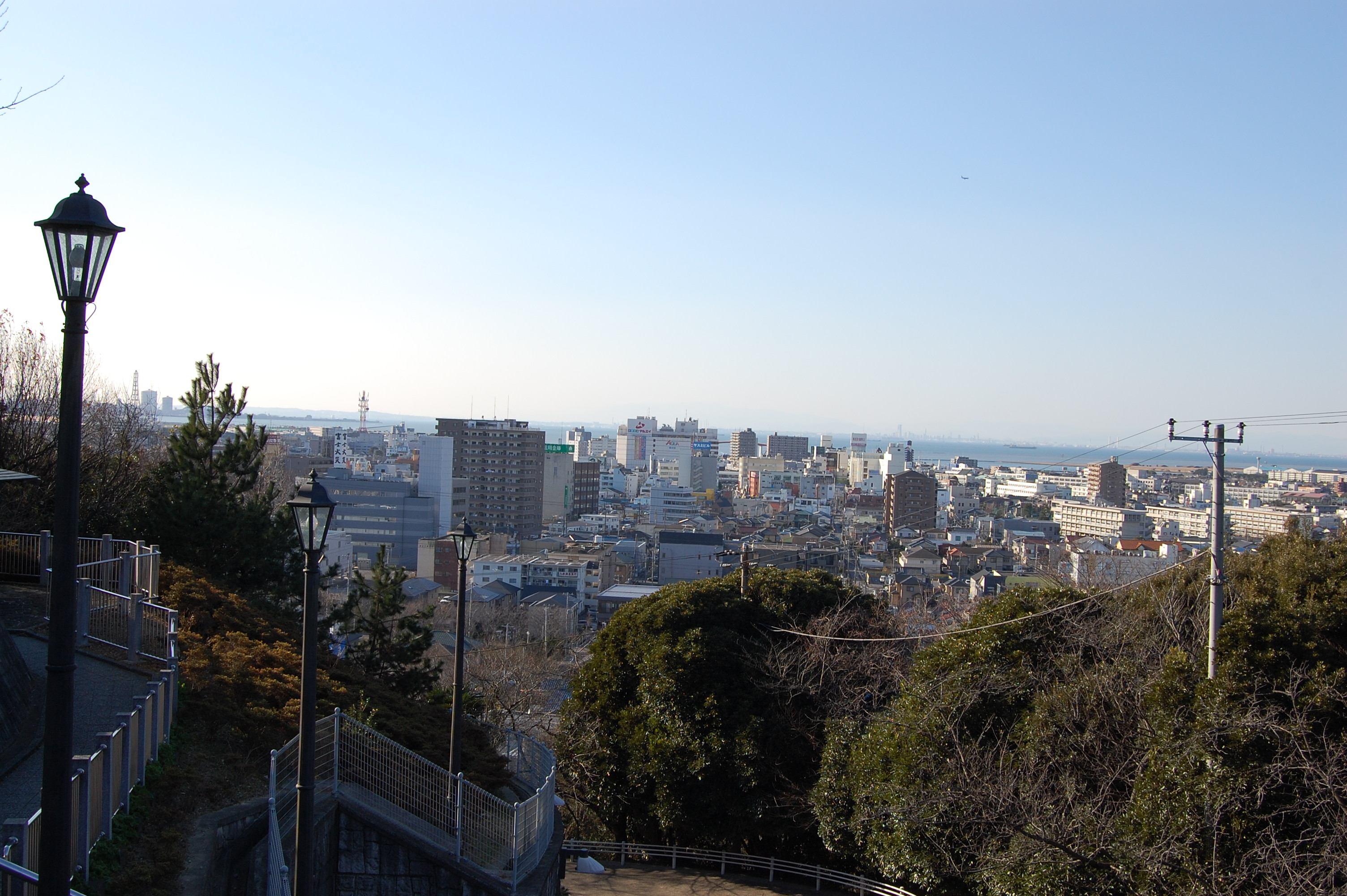 木更津市街地。太田山より木更津駅方面に撮影